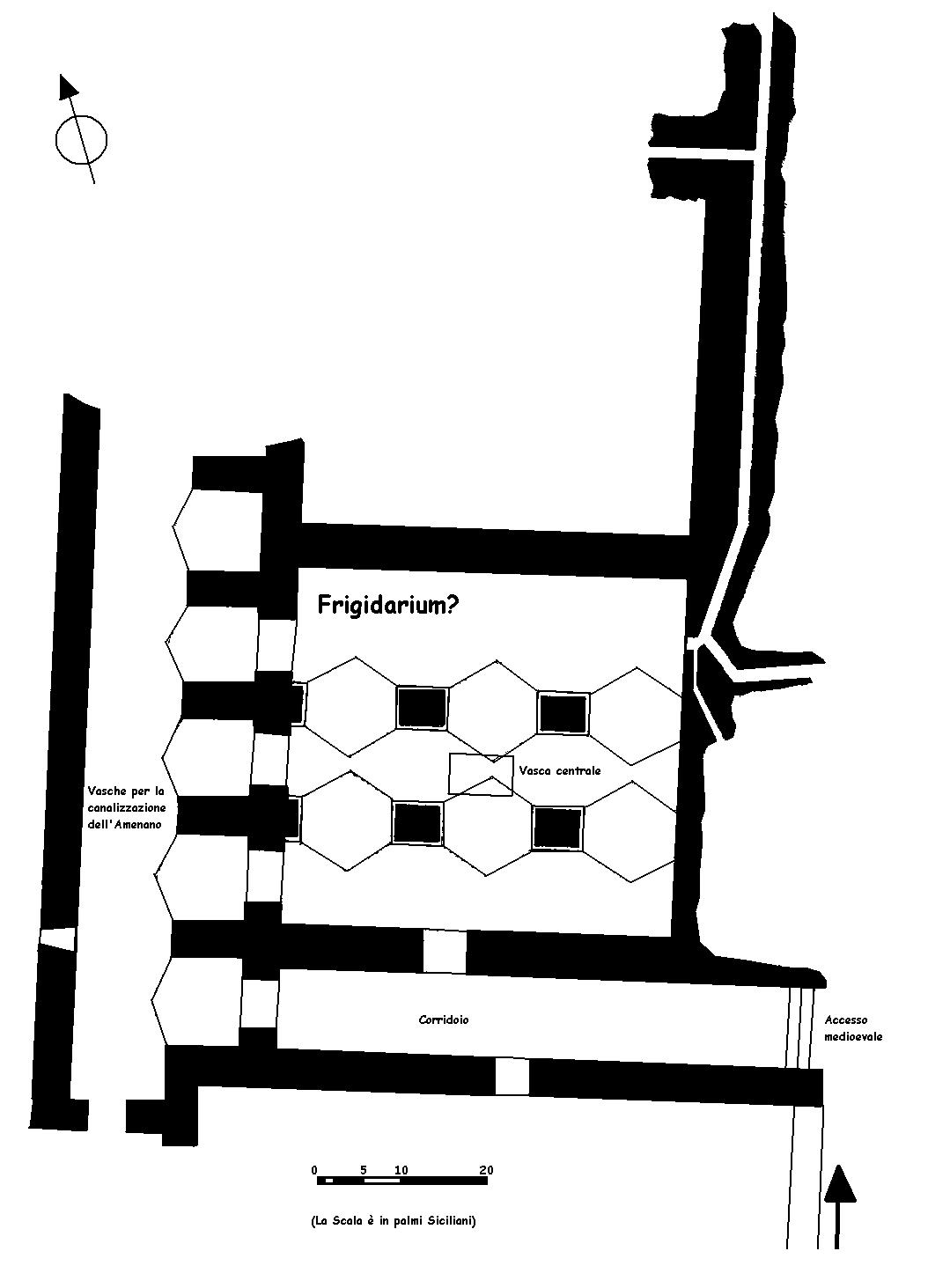 pianta delle terme achelliane di Catania (dalla propria Tesi di Laurea).